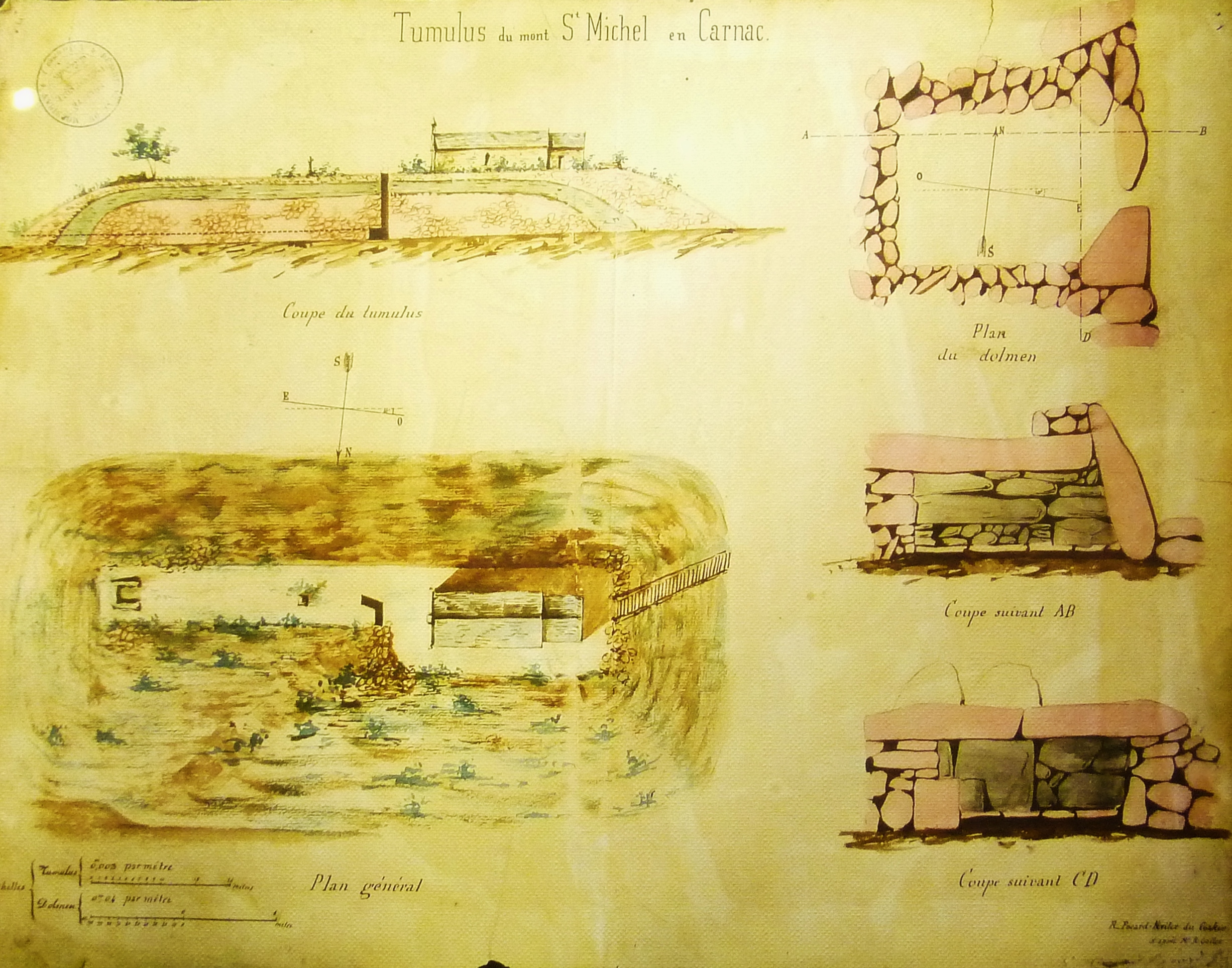 Plan aquarellé du tumulus Saint-Michel à Carnac datant de 1863 environ (par René Kerviler)